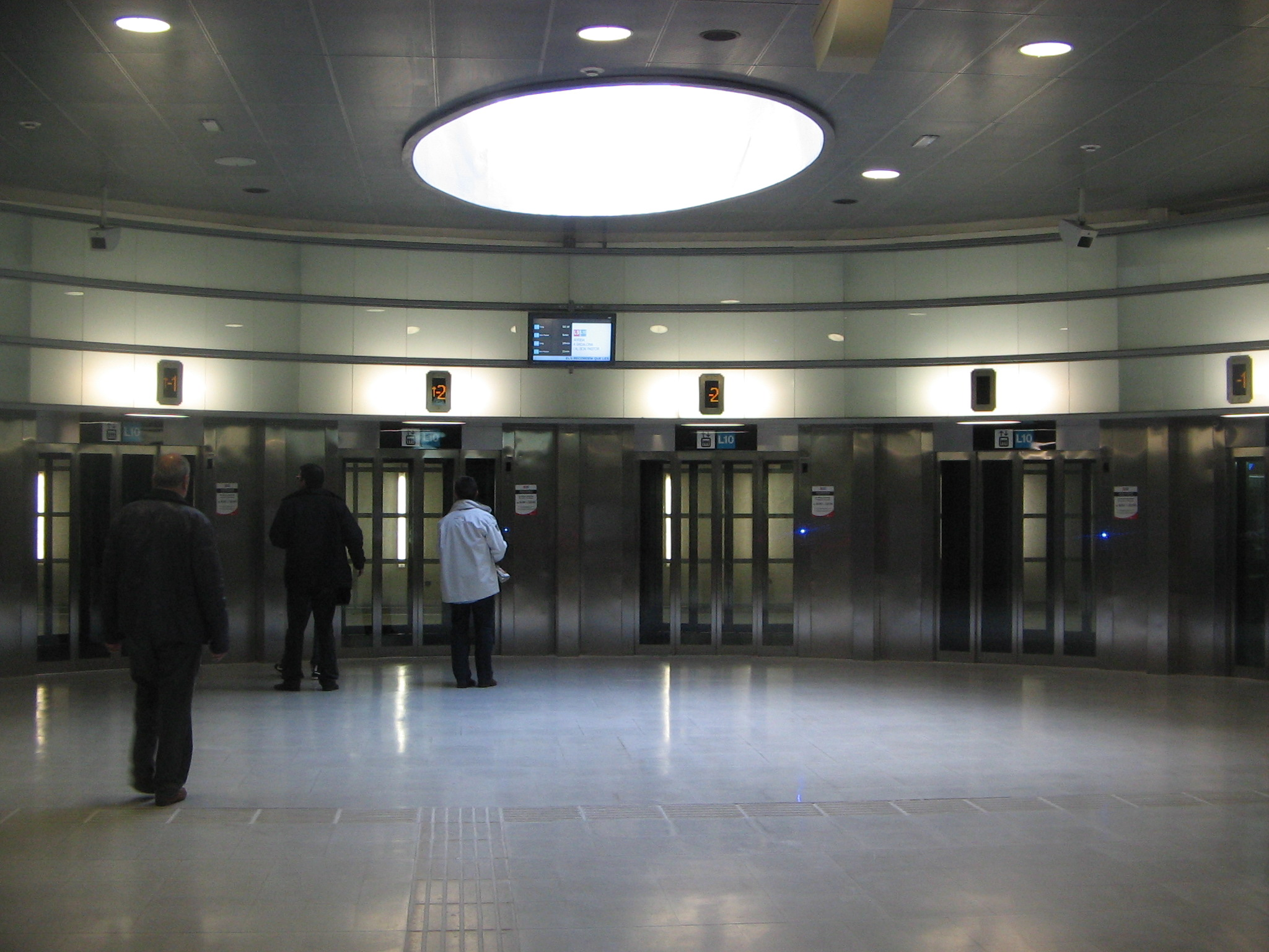 Esatció de La Salut.